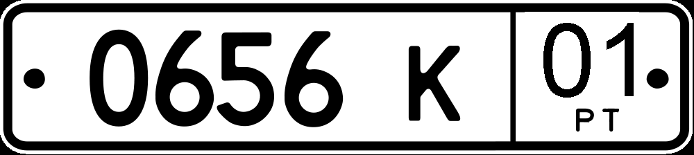 Номера юридических лиц Таджикистана, стандарт 1996 года